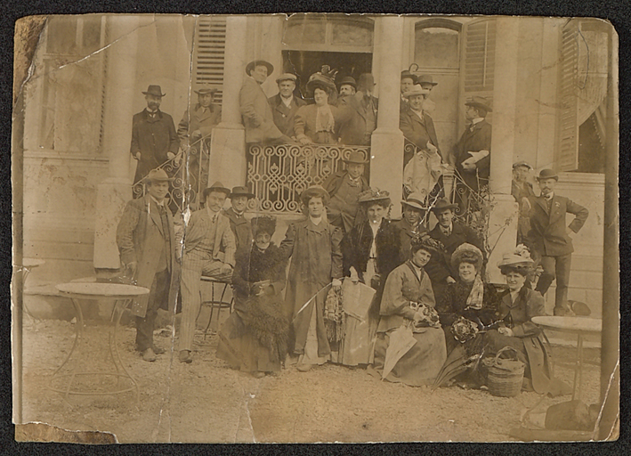 Български народен театър на посещение в Битоля, 1908 година. К. Стоянов, С. Огнянов, И Шмаха, Ек. Златарева, П. П. Славейков, В. Кирков, Ат. Кирчев, Хр. Ганчев, Св. Добрев, Н. Христов, В. Шумлянска, К. Стоянова